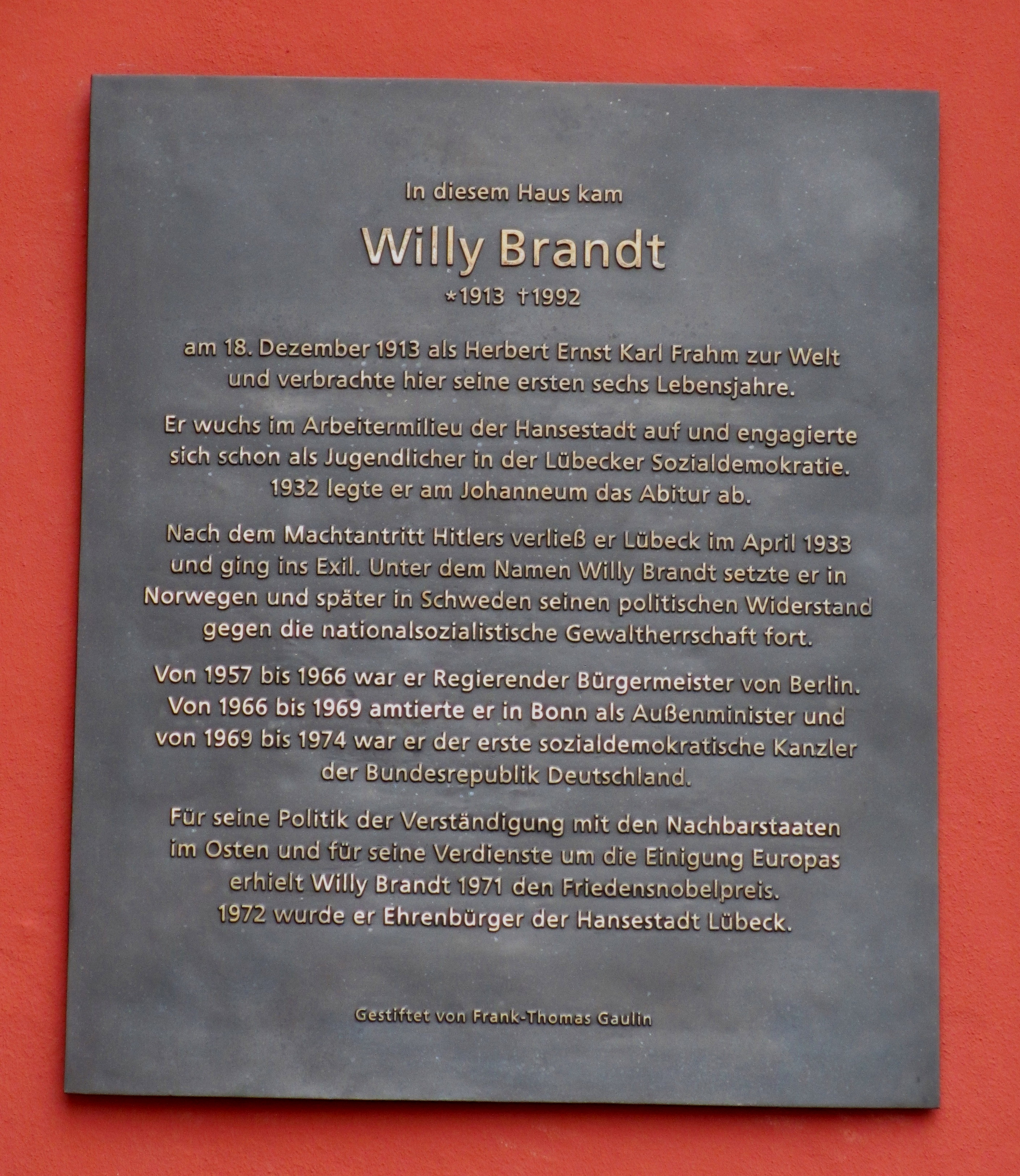 Gedenktafel am Geburtshaus von Willy Brandt, Meierstraße in Lübeck, 2013 angebracht, gestiftet von Frank-Thomas Gaulin